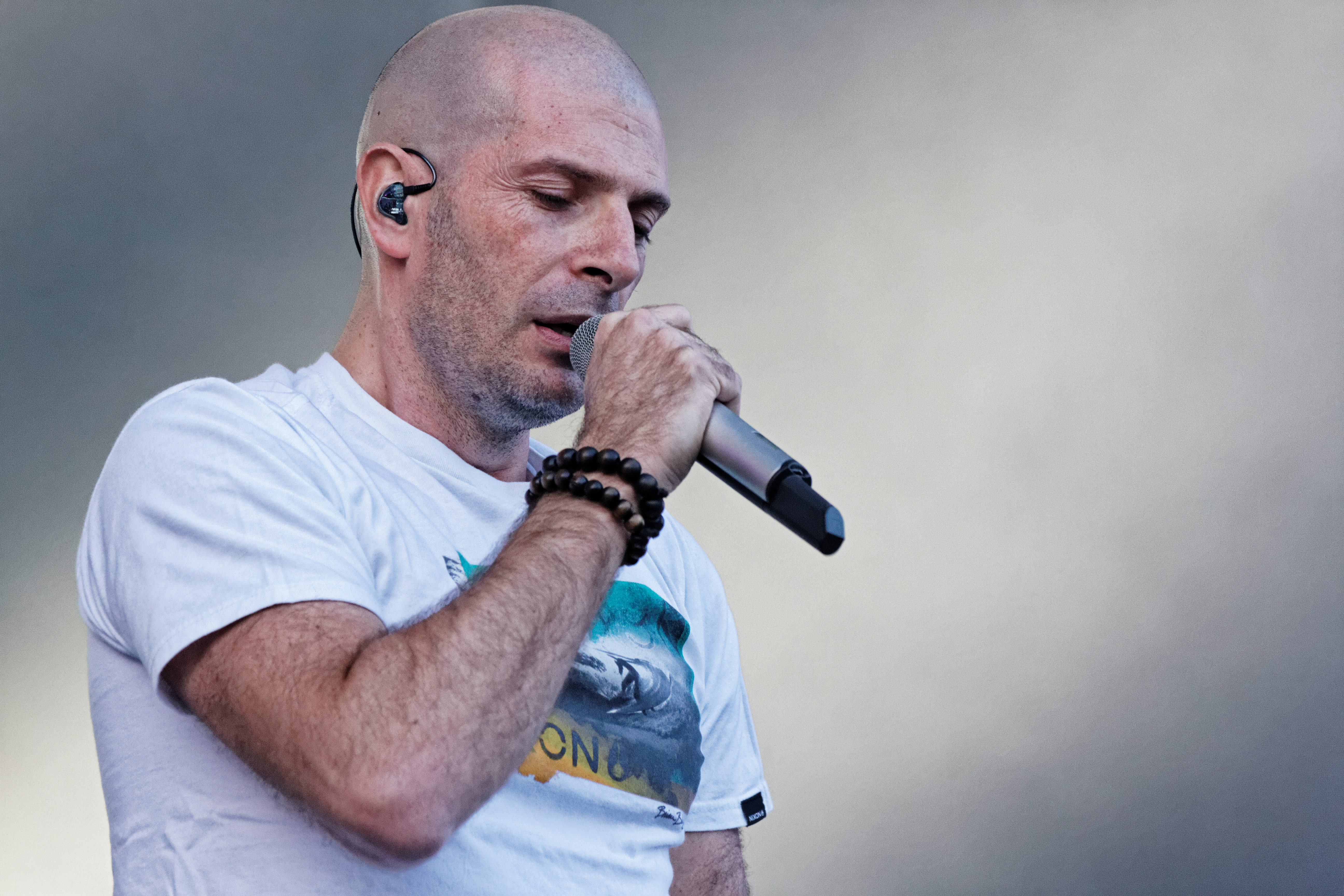 IAM en concert sur la grande scène lors de la fête de l'Humanité 2014.